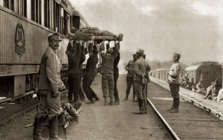 Galicija – prevoz ranjencev v bolnišnico